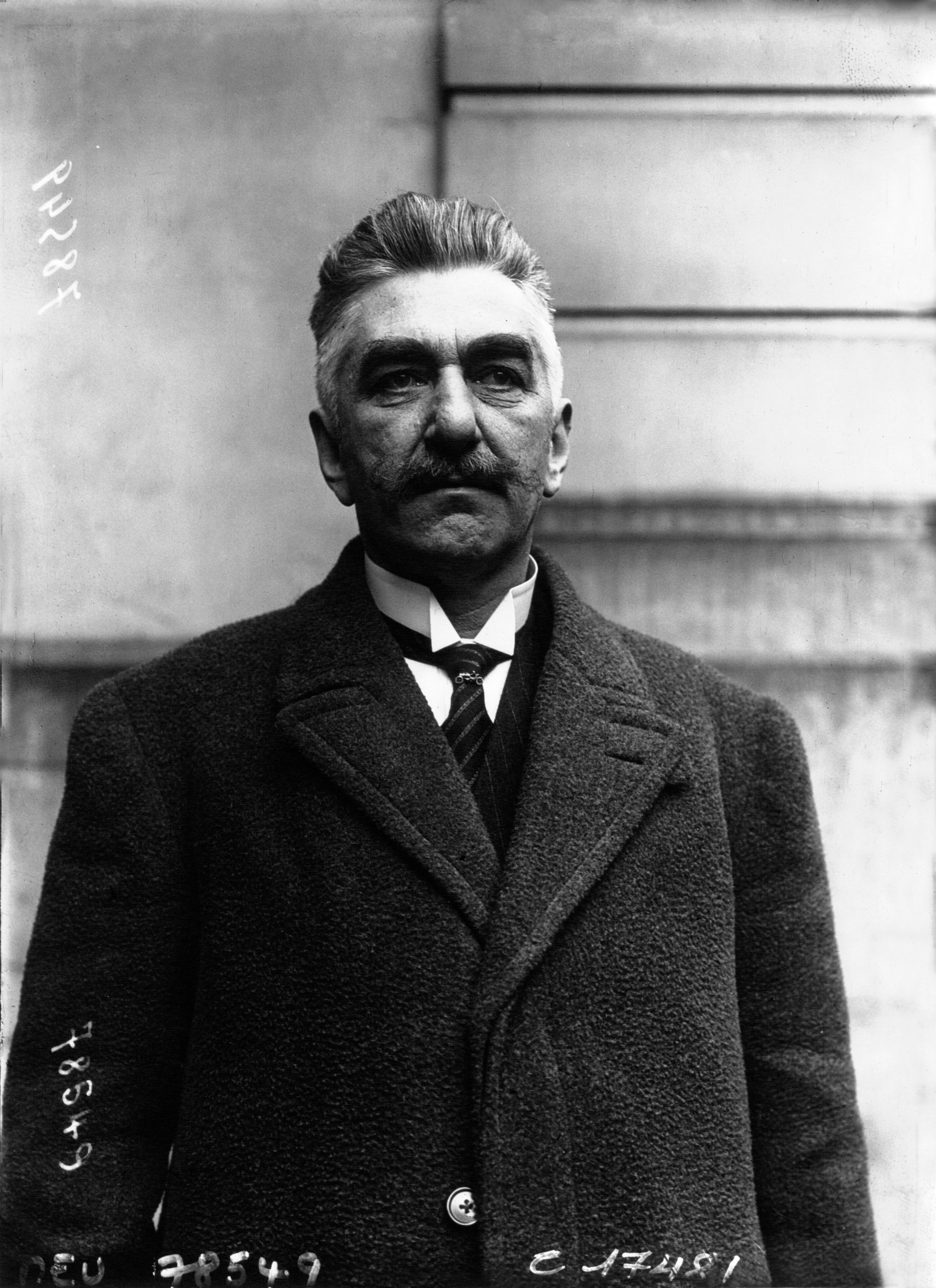 M. de Beukelaer (Belgique) président du bureau de l'U.C.I..